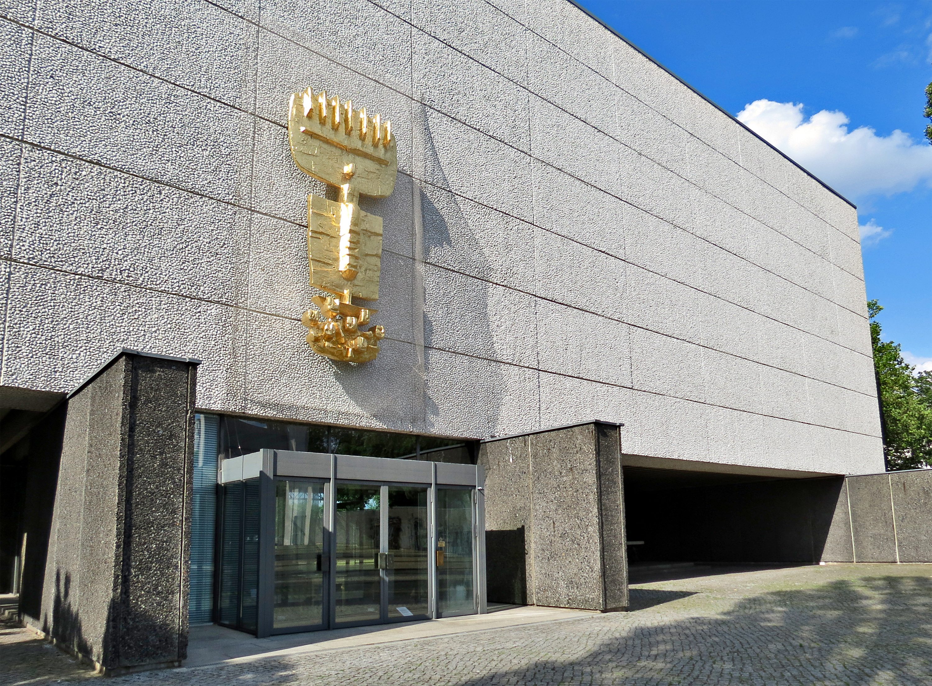 Maria Regina Martyrum Eingangsportal